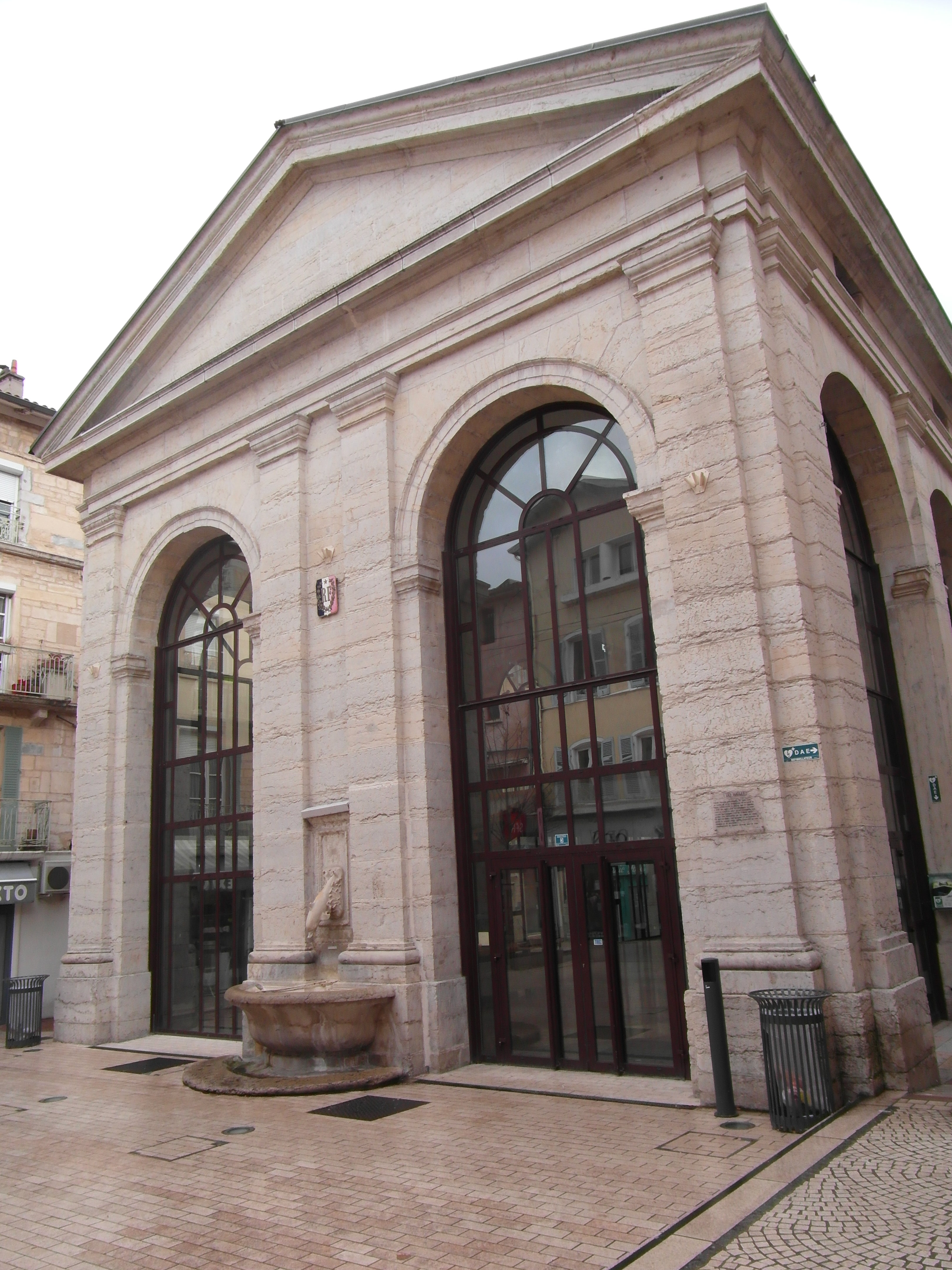 Les halles de Bourgoin-Jallieu, vue de l'arrière en février 2019